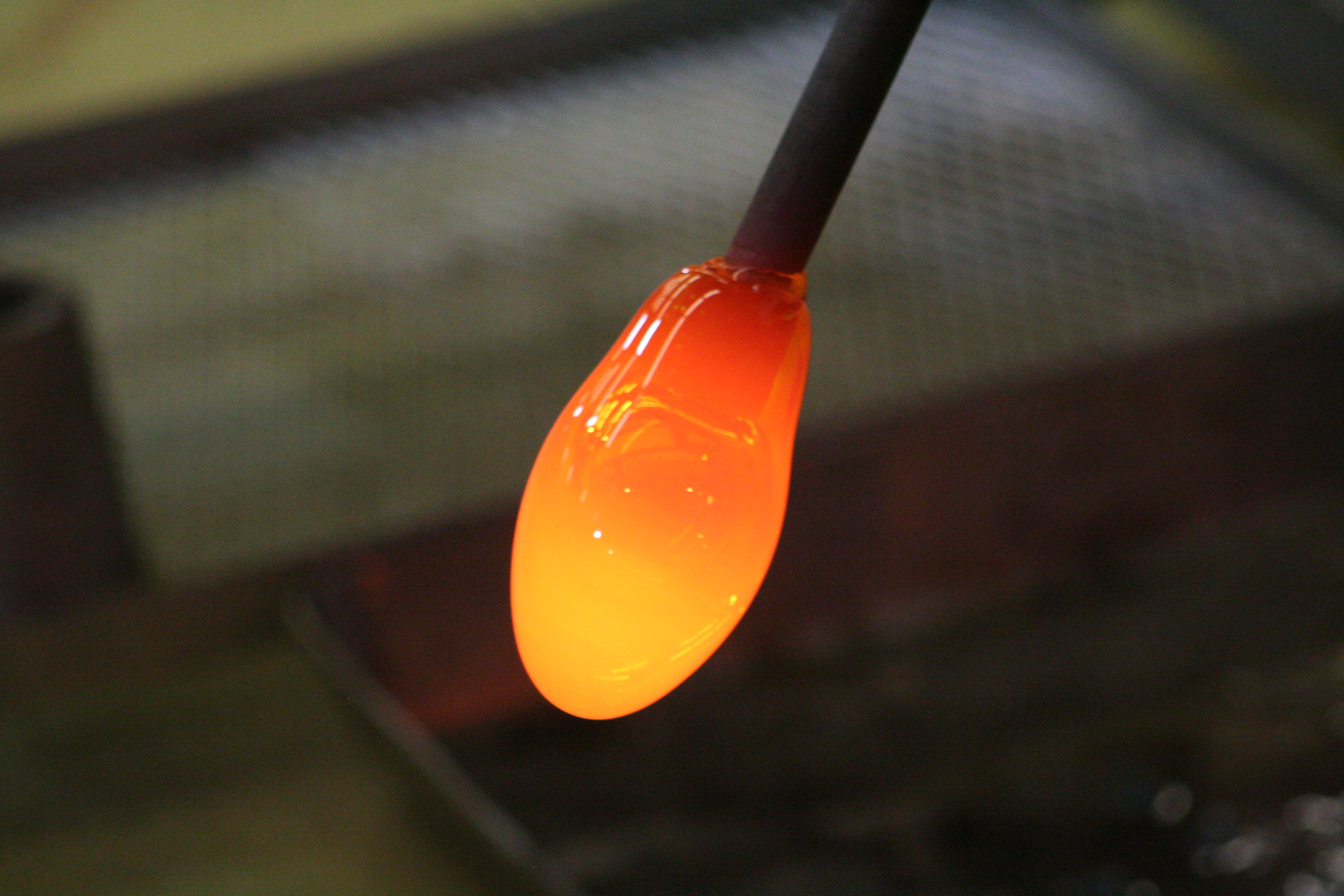 2009年9月29日から10月1日にかけて行なわれたNHK神戸のテレビ実況中継キャラバンによるテレビ収録の様子。キャラバンの司会者は今城和久と久保静。最終中継地である相生市内の相生ペーロン城にて撮影。 棒の先のガラス塊。